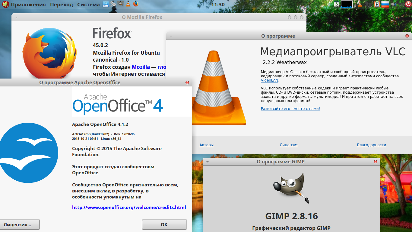 Основные программы в операционной системе Matuntu X64-M112